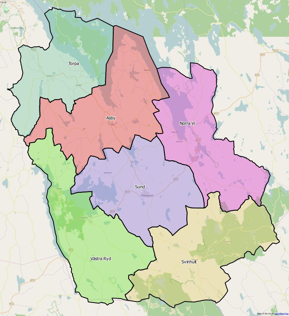 Distriktsindelningen i Ydre kommun World file 71.5986691243647897 0 0 -71.5986691243647897 1666571.63939123647287488 7975782.12288807891309261